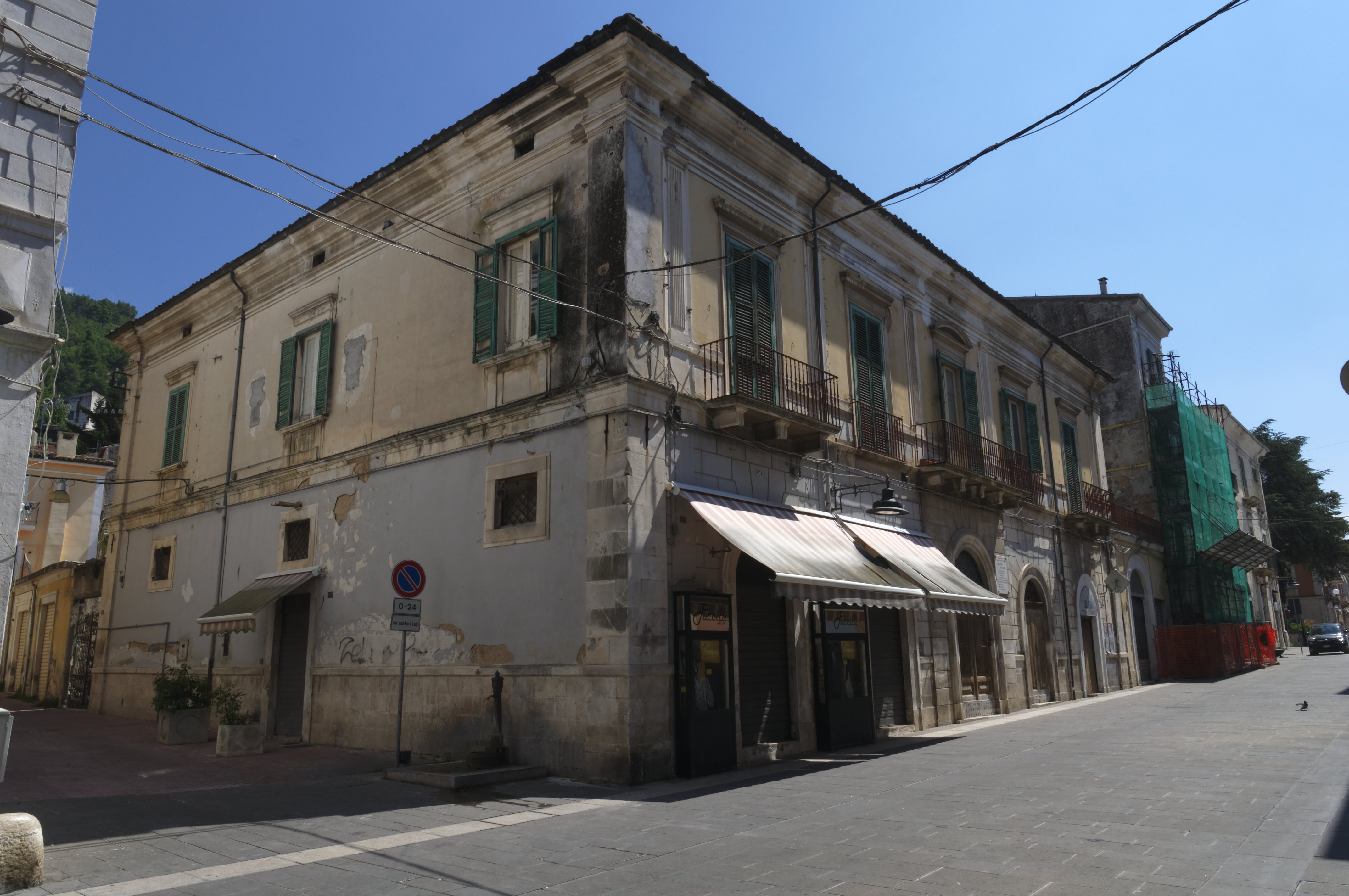 Popoli 2016